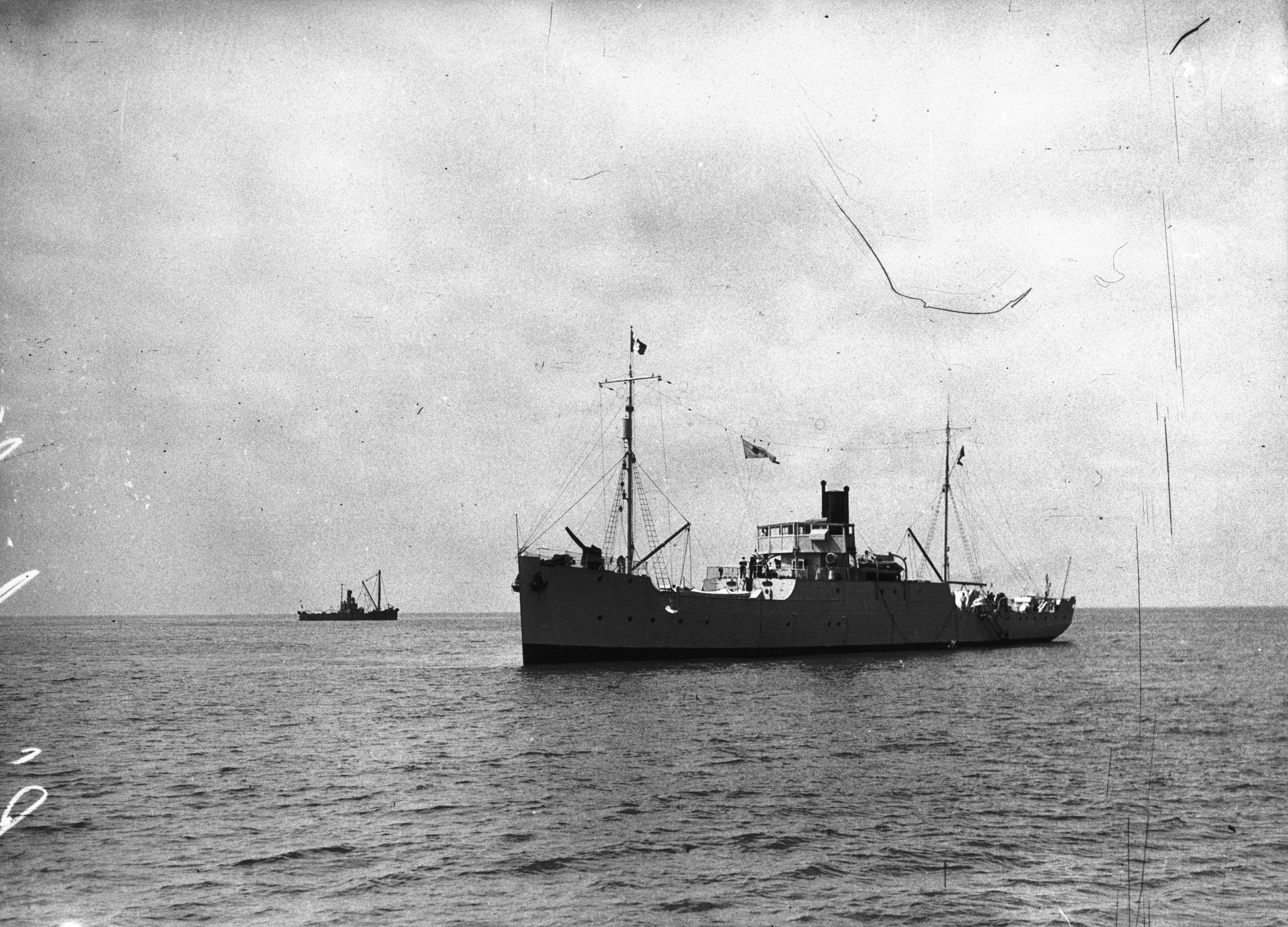 Cherbourg : catastrophe du Prométhée : de gauche à droite, l'Artiglio et la Fidèle, juillet 1932